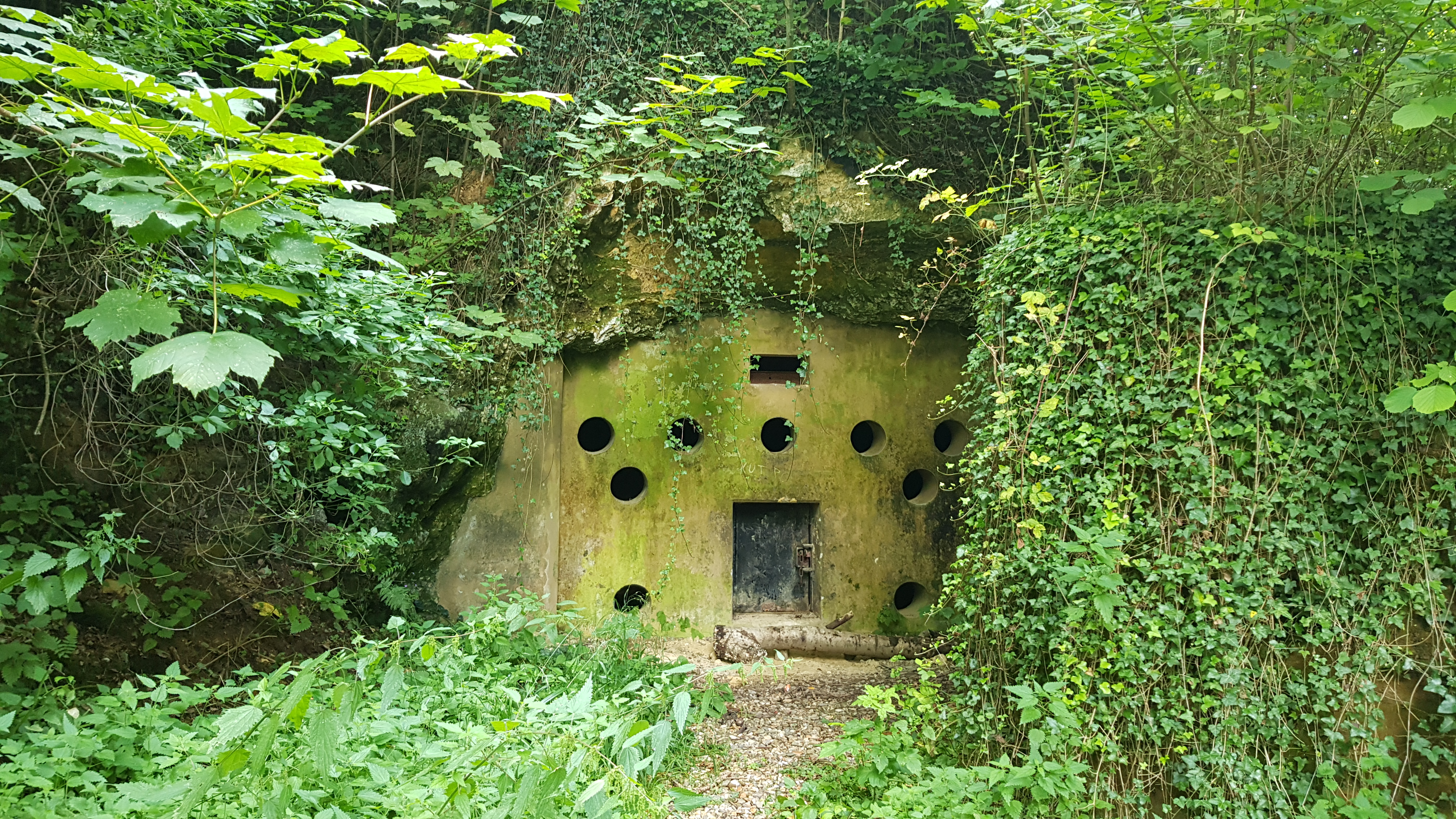 Viltergroeve, Valkenburg, Nederland